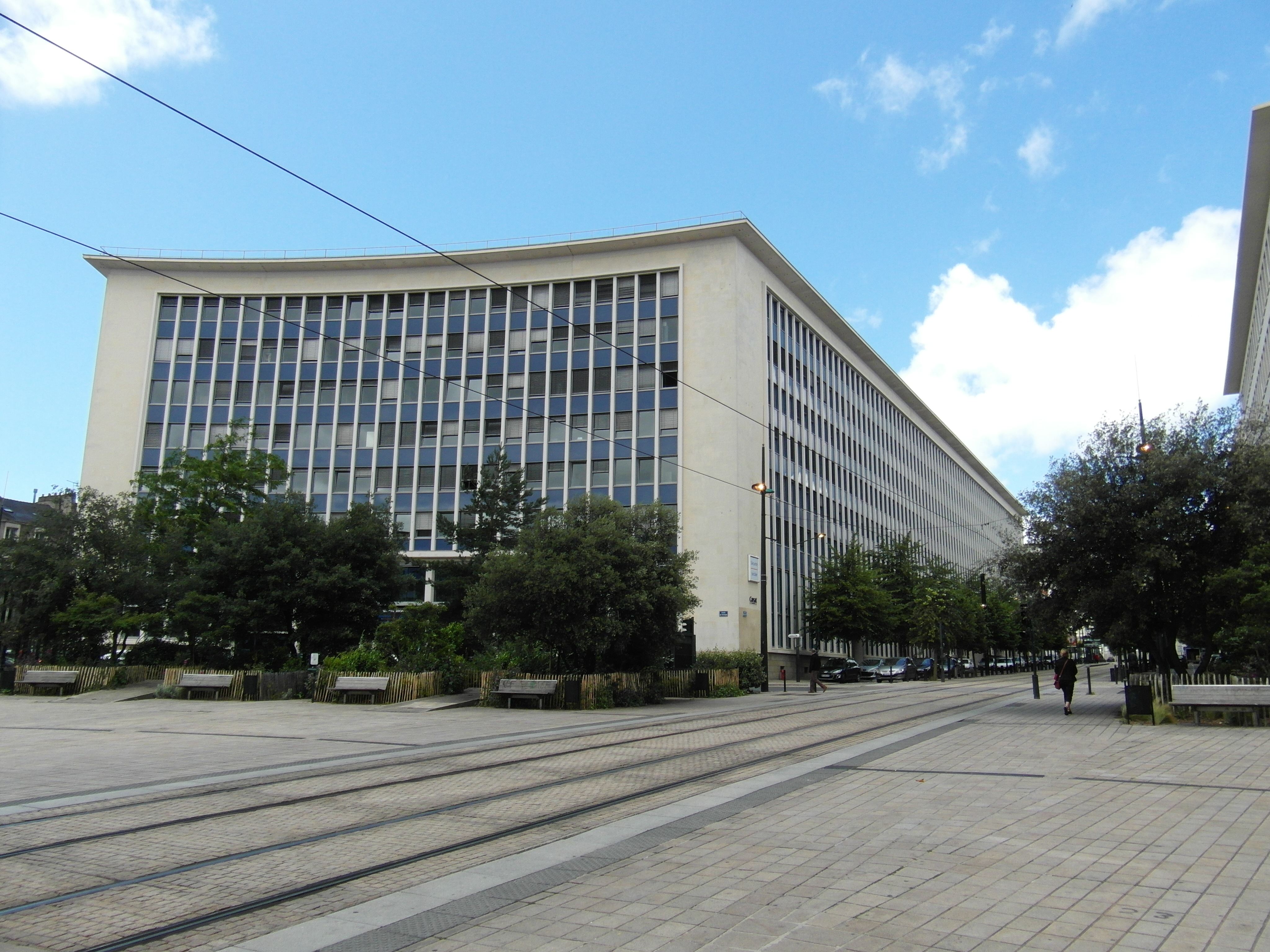 Place de Bretagne / Rue du Marchix